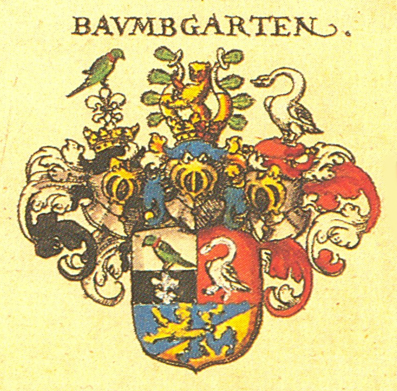 Wappen der Nürnberger und Augsburger Patrizierfamilie Freiherren Paumgartner von Baumgarten